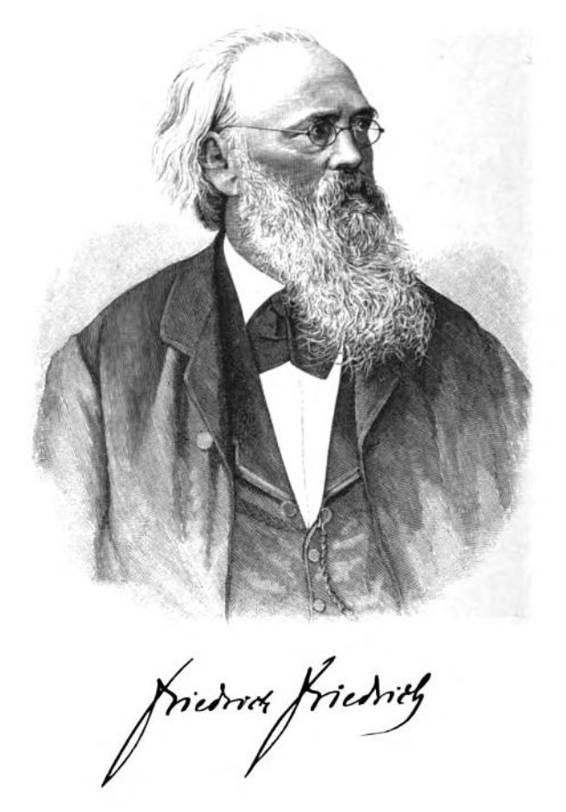 Hermann Friedrich Friedrich. In: Die Gesellschaft, Volume 3, Part 2. Hrsg.: Michael Georg Conrad, Arthur Seidl. Leipzig: Wilhelm Friedrich 1887